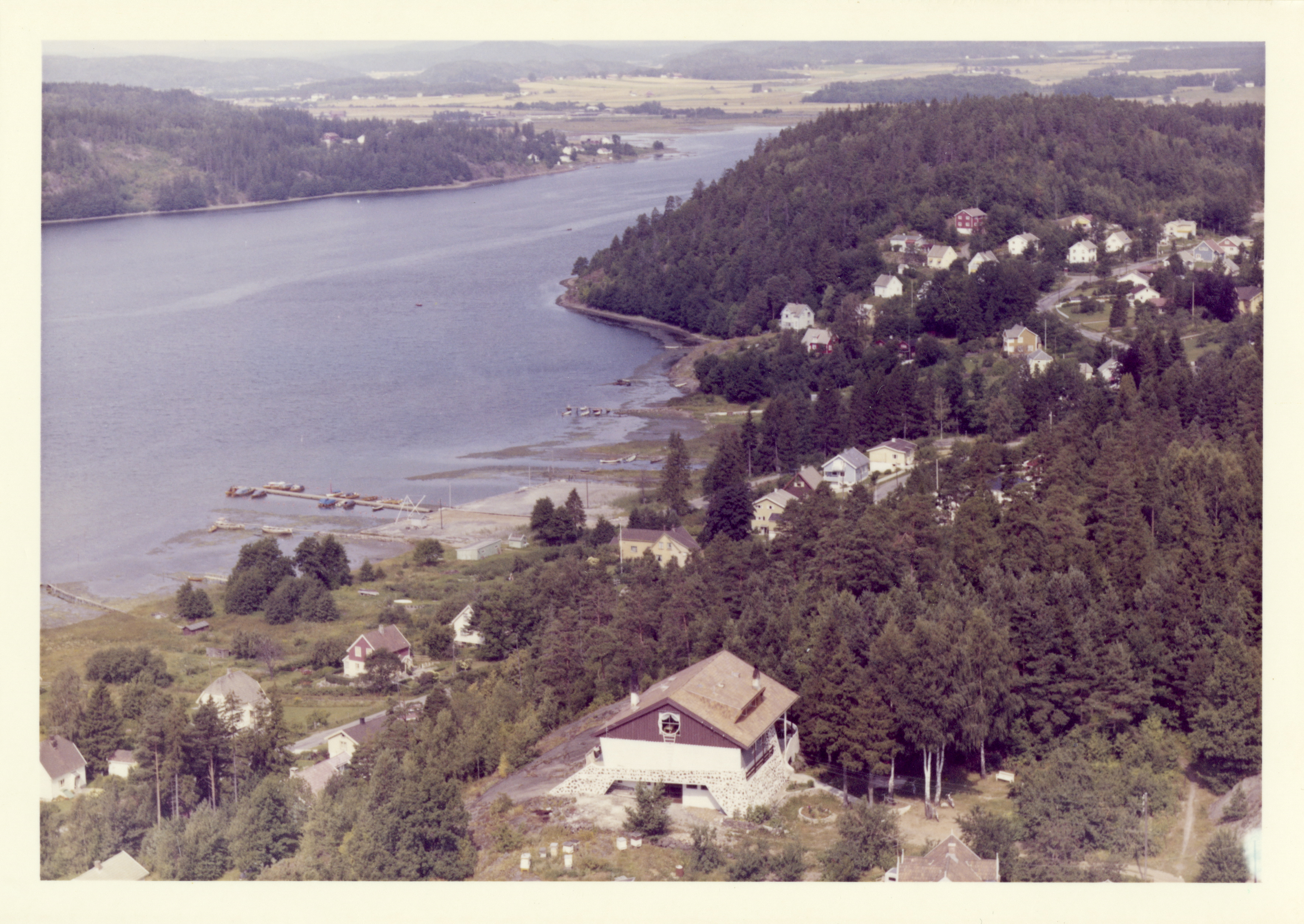 WF.S.188504